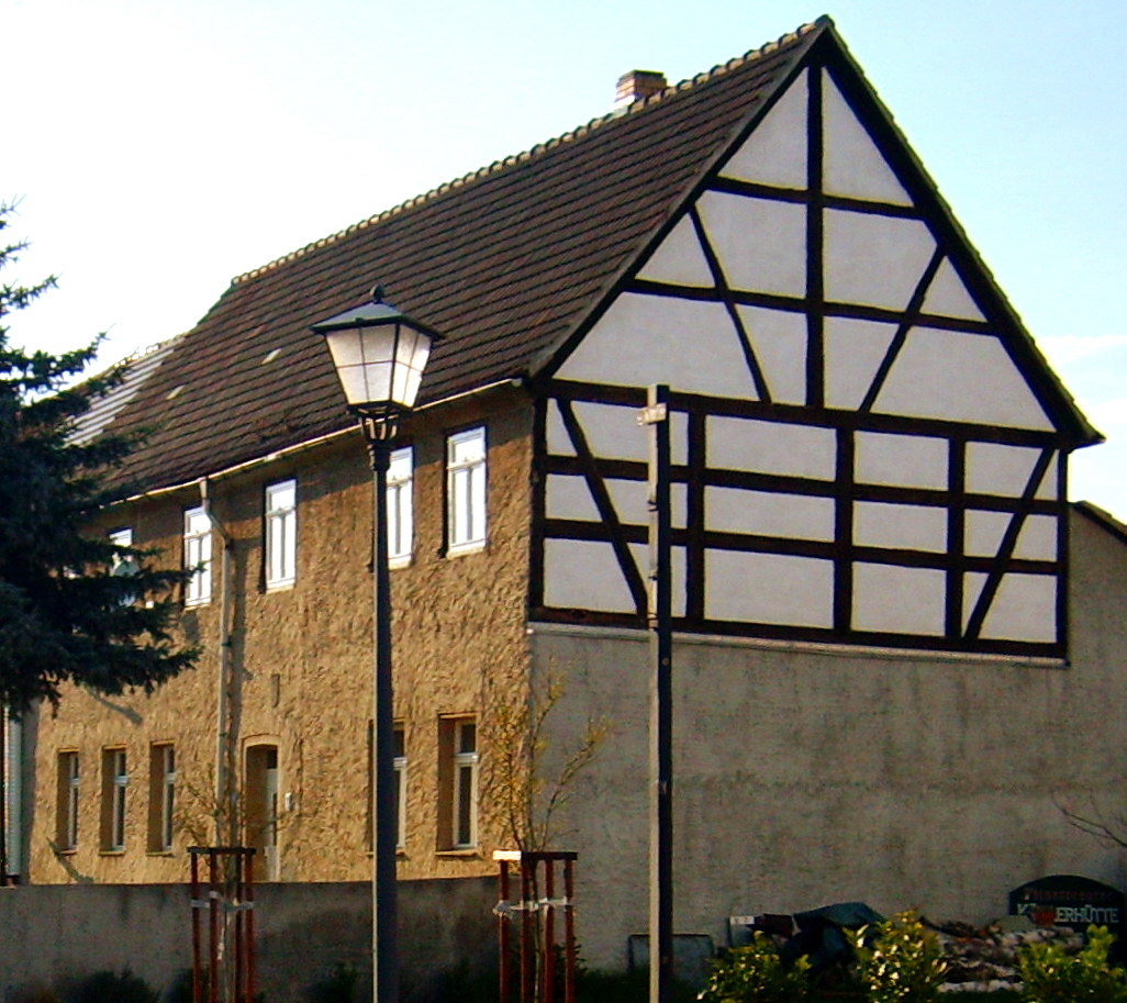 Das Baudenkmal Rathausstraße 10 in Elsterwerda.